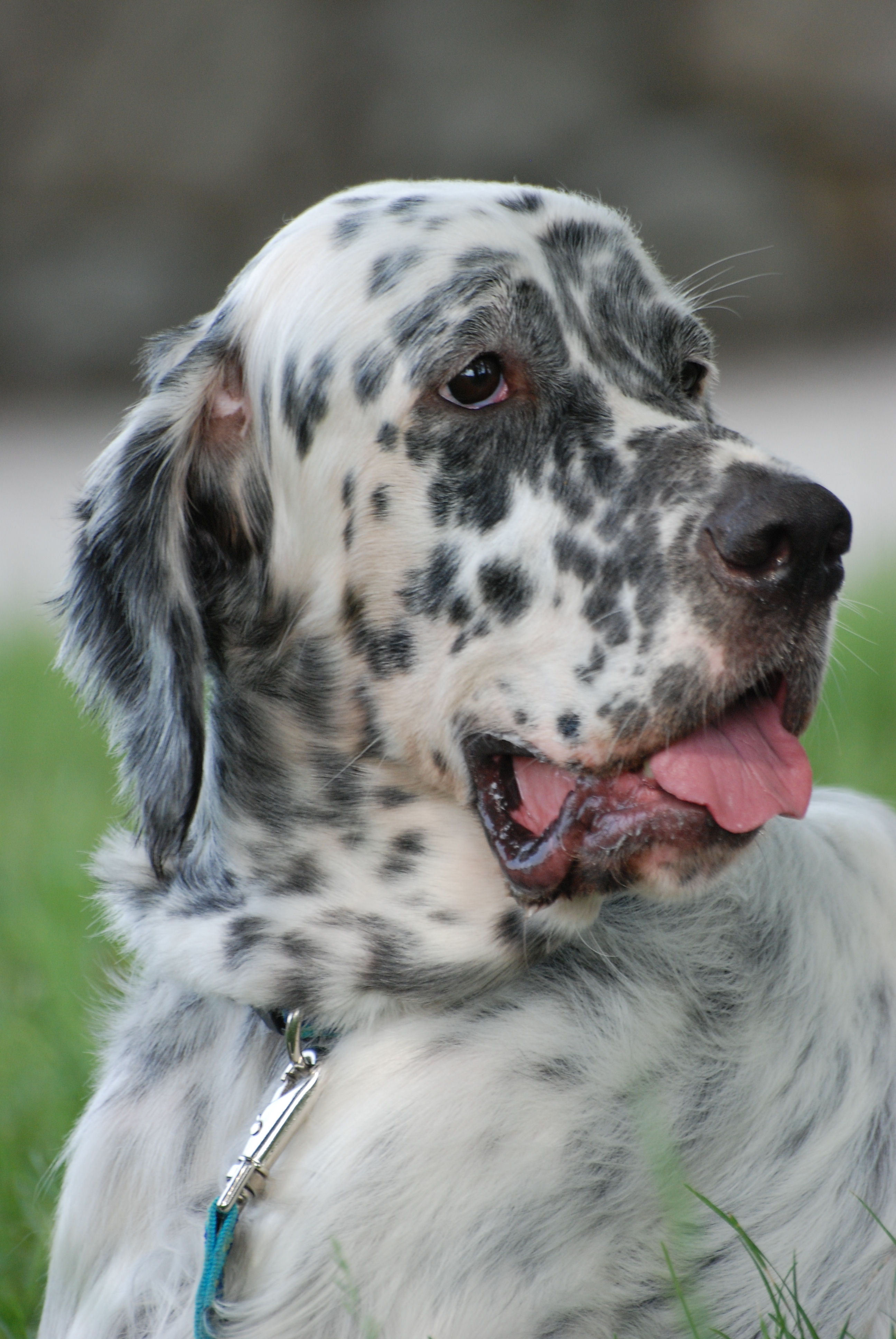 English Setter, Dogs Show Racibórz RAVEN WHITE Magenta